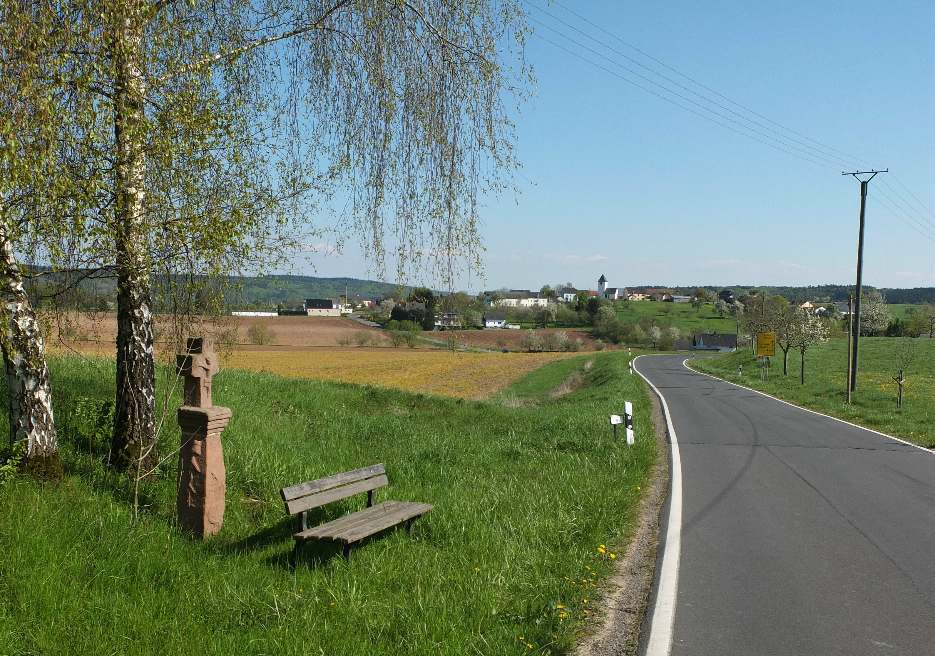 Wayside cross, the so-called "Metzen-Kreuz", near Halsdorf (Eifel), Gemany, dated 1777, commemorating the murder of Mathias Metzen. The village of Halsdorf in the background. This is a photograph of an architectural monument.It is on the list of cultural monuments of Halsdorf